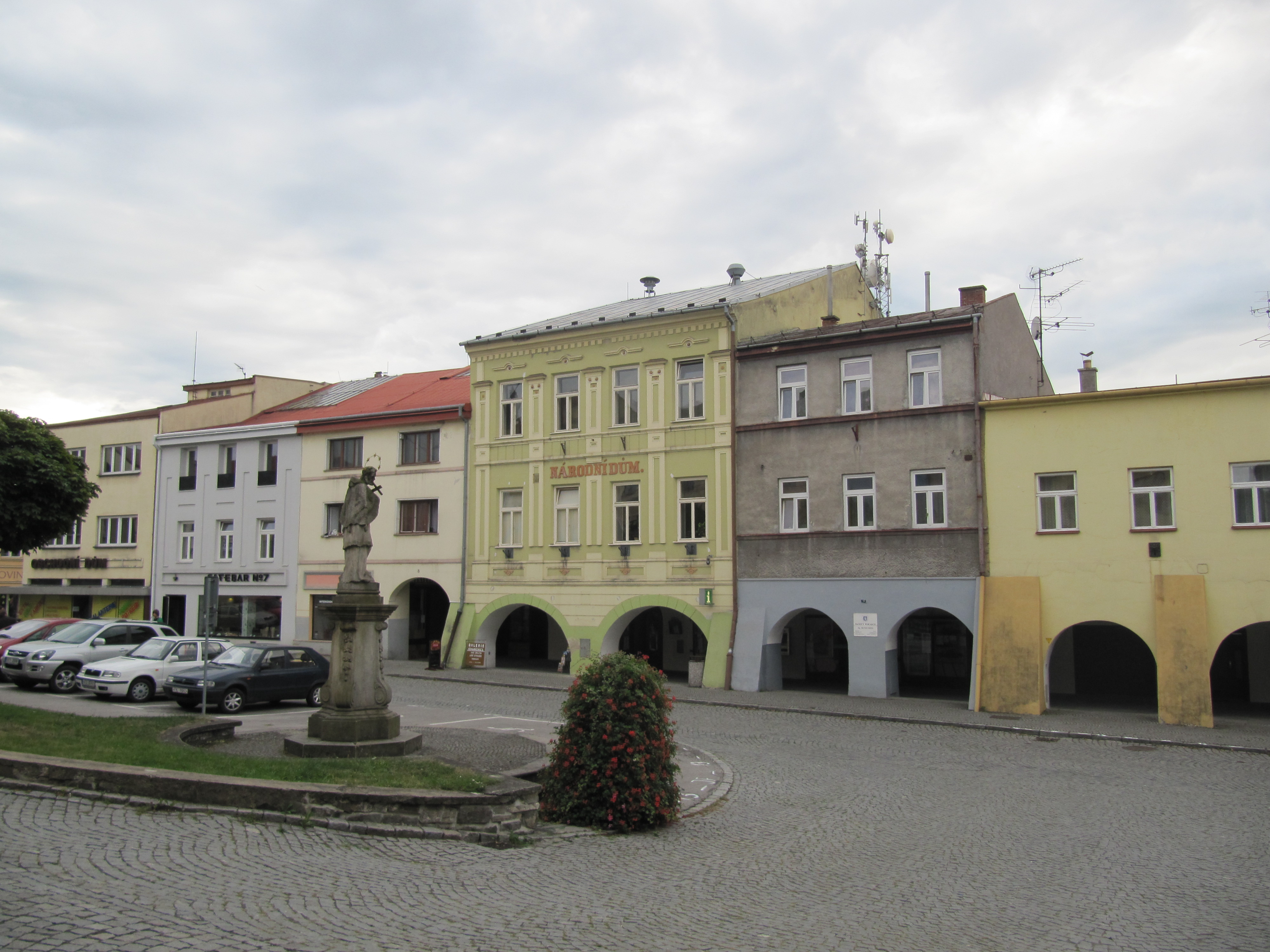 Brušperk